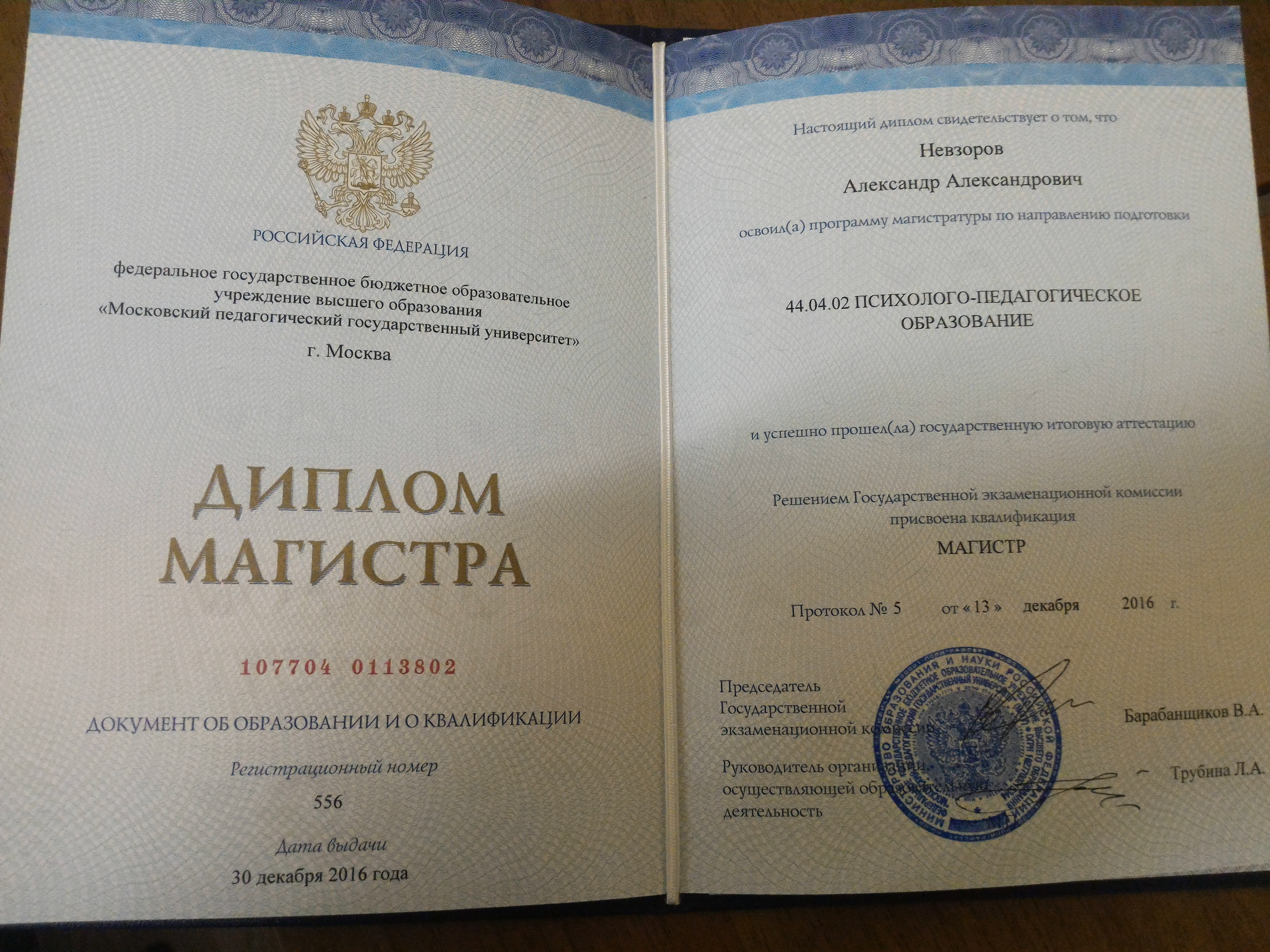 Диплом магистра психолого-педагогического направления. Владелец: Невзоров Александр Александрович